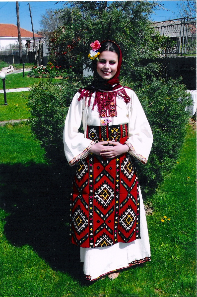 Женска кумановска ношња. Licensing Template:Јв-предато